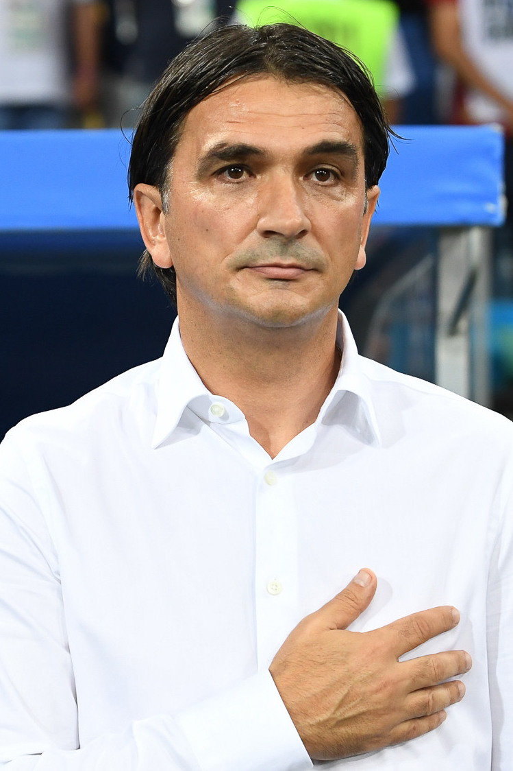 Сборная России заканчивает ЧМ-2018 с поднятой головой. Хорватия выходит в полуфинал